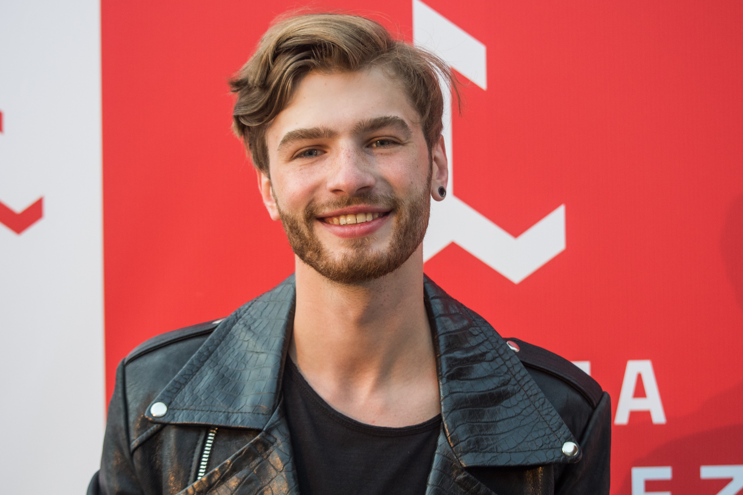 Юстс на фестивале «Лайма. Рандеву. Юрмала 2017»